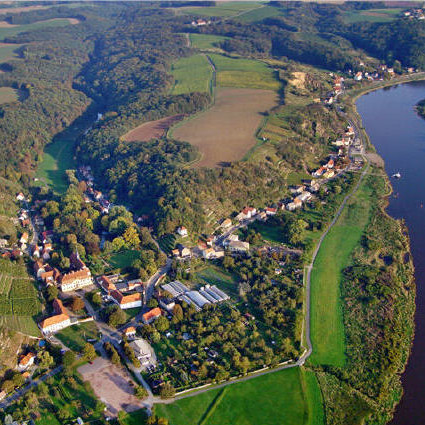 Diesbar-Seußlitz, Barockschloss Seußlitz von George Bähr, Goldkuppe (slawische Schanze), Luftbild